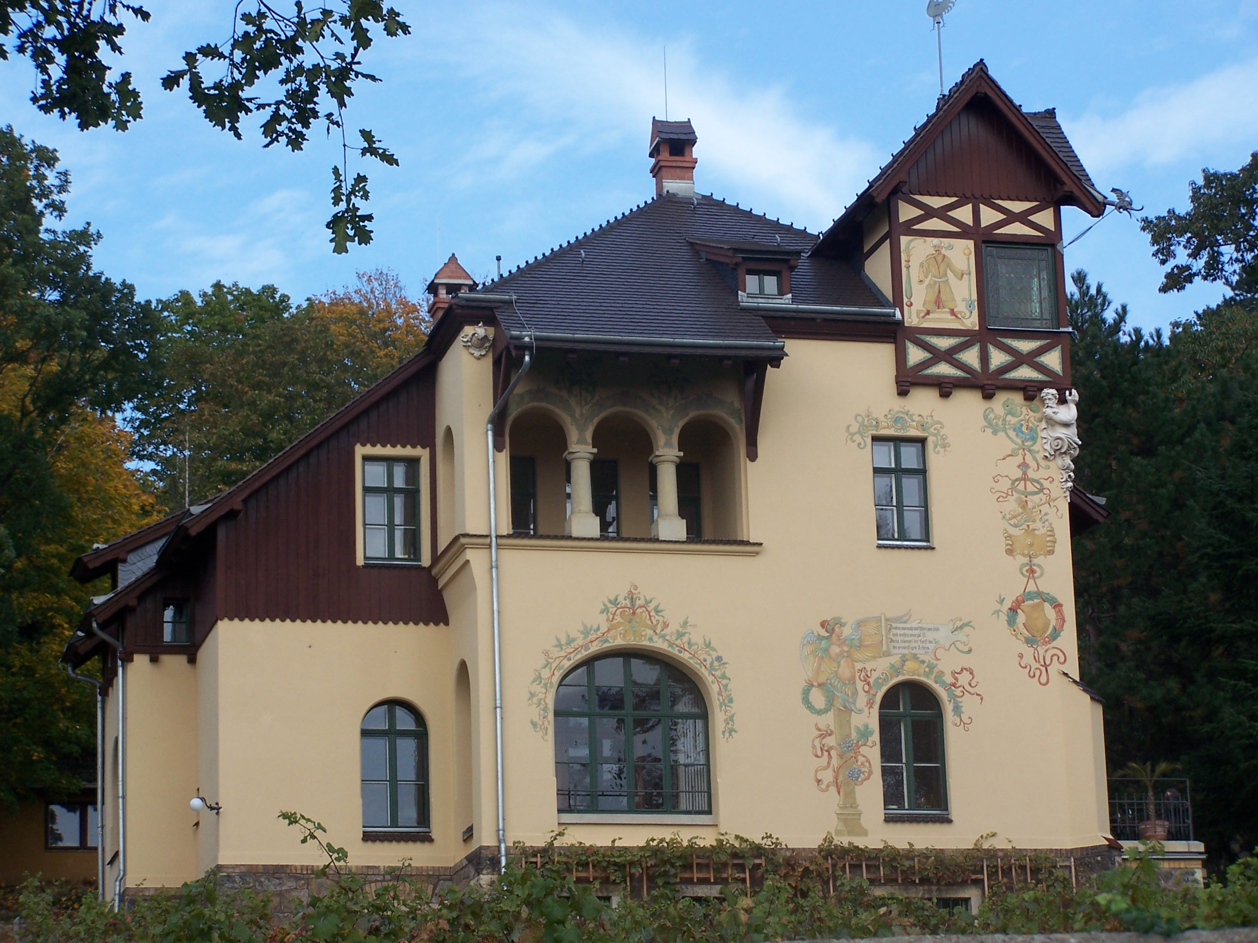 Villenartiges Landhaus in Radebeul, Weinbergstraße 40, Architekt und Erstbesitzer Oswald Haenel, Ausführung Gebr. Ziller, 1894/95